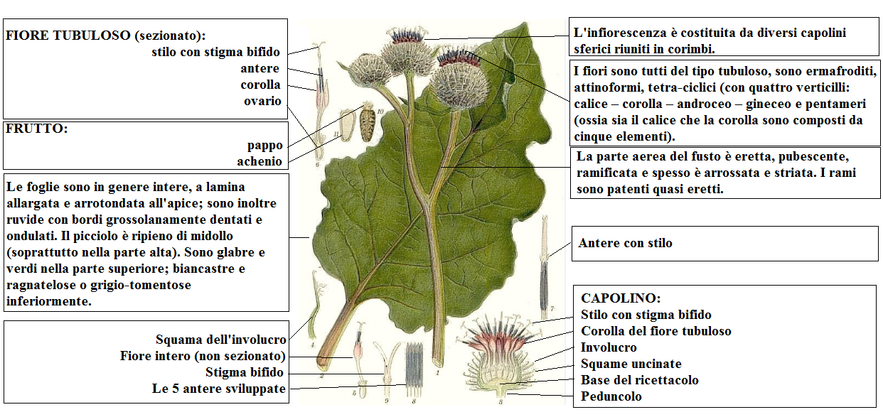 Arctium tomentosum Lindman DESC